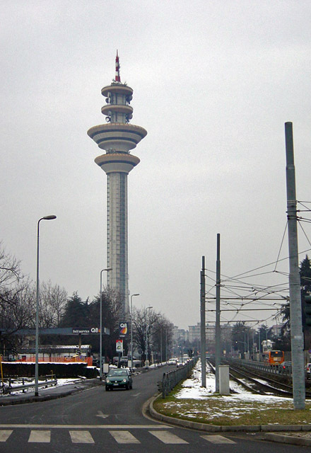 Rozzano